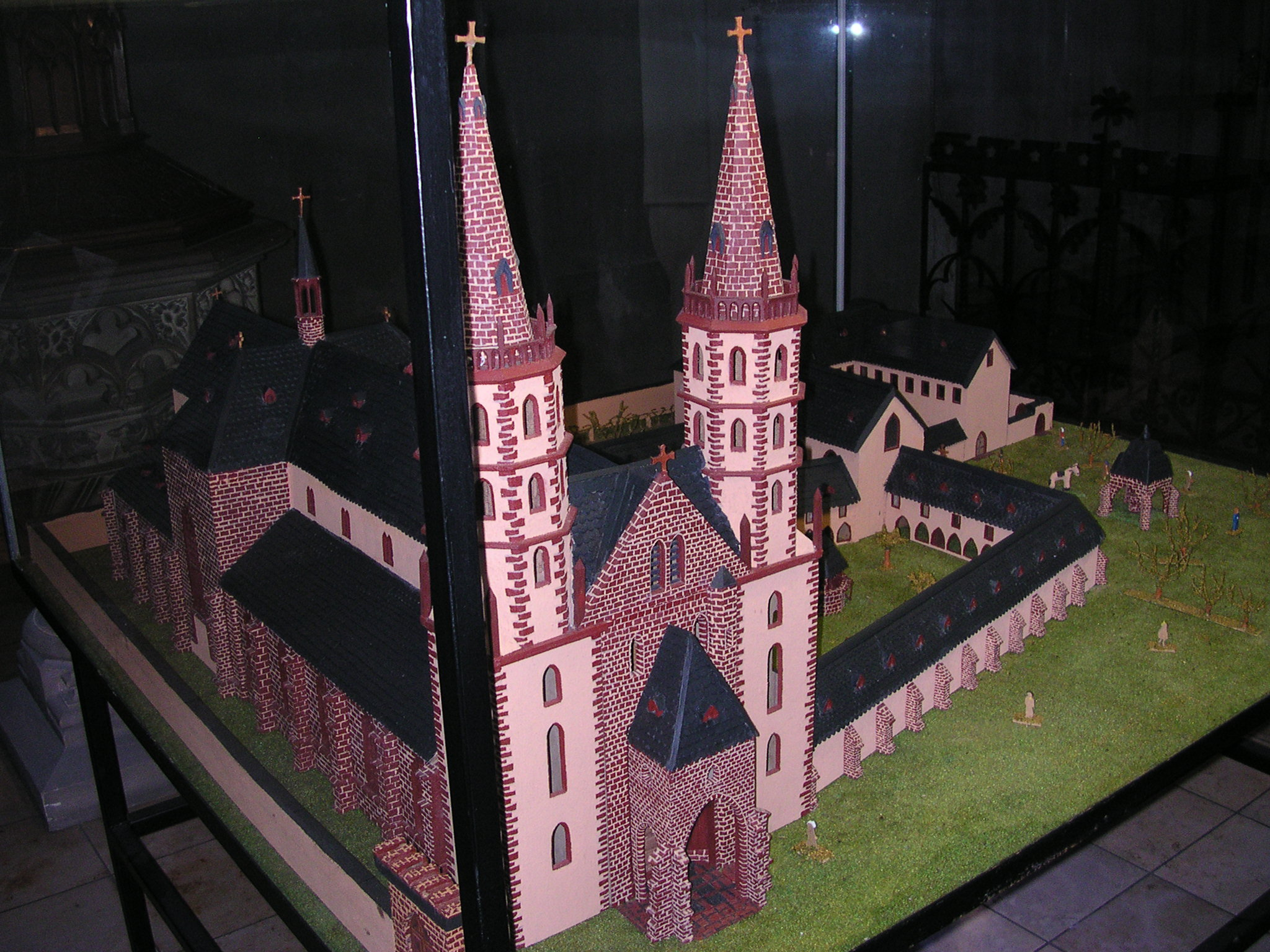 Worms, Modell der rk. Liebfrauenkirche, aufgestellt am Eingang derselben